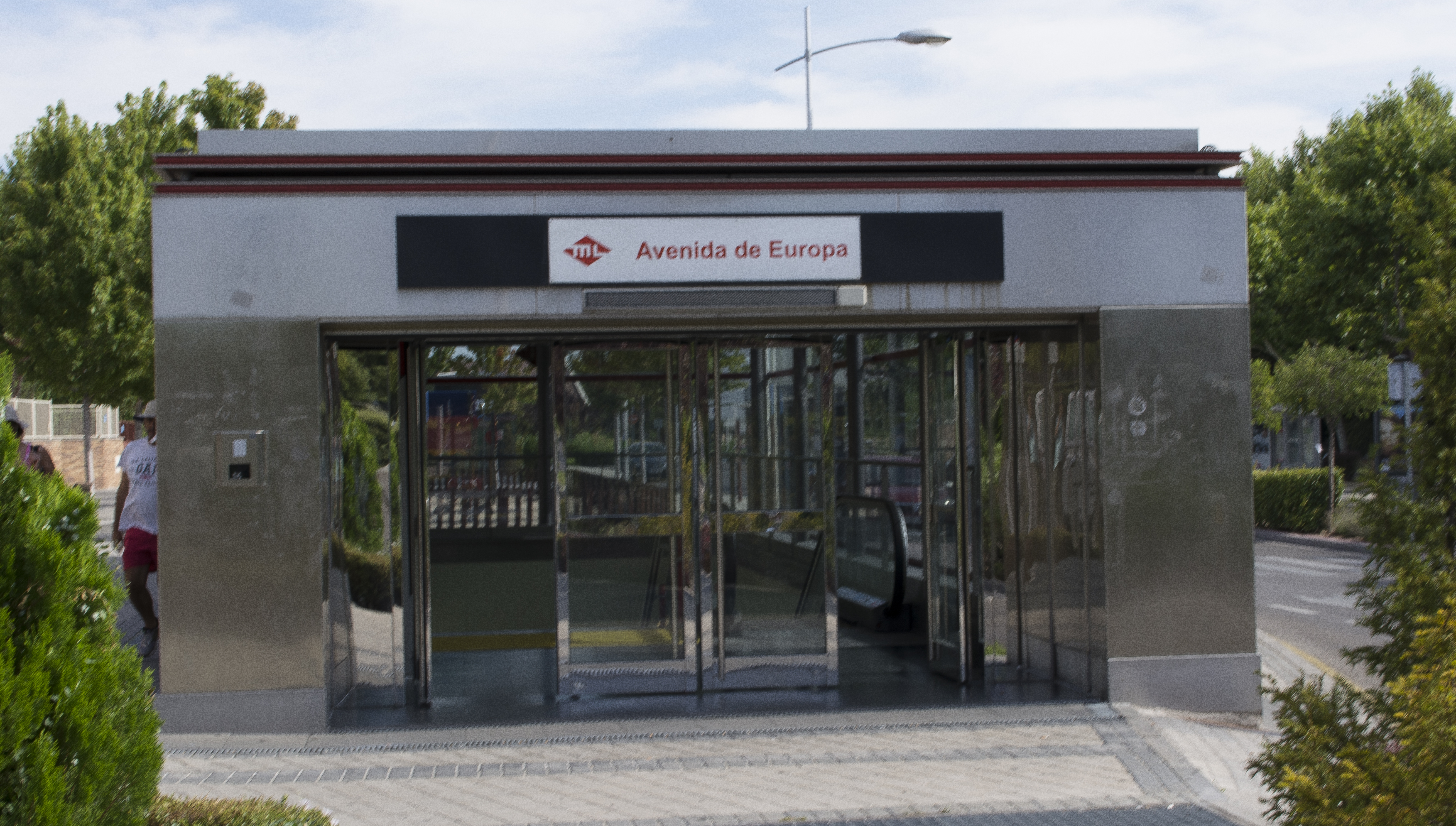 Acceso exterior a la estación Avenida de Europa, del Metro Ligero Oeste, situado frente a la rotonda en la que confluyen la Avenidas Comunidad de Madrid y la que da nombre a la parada.